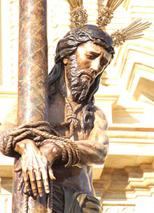 Cristo de la misericordia